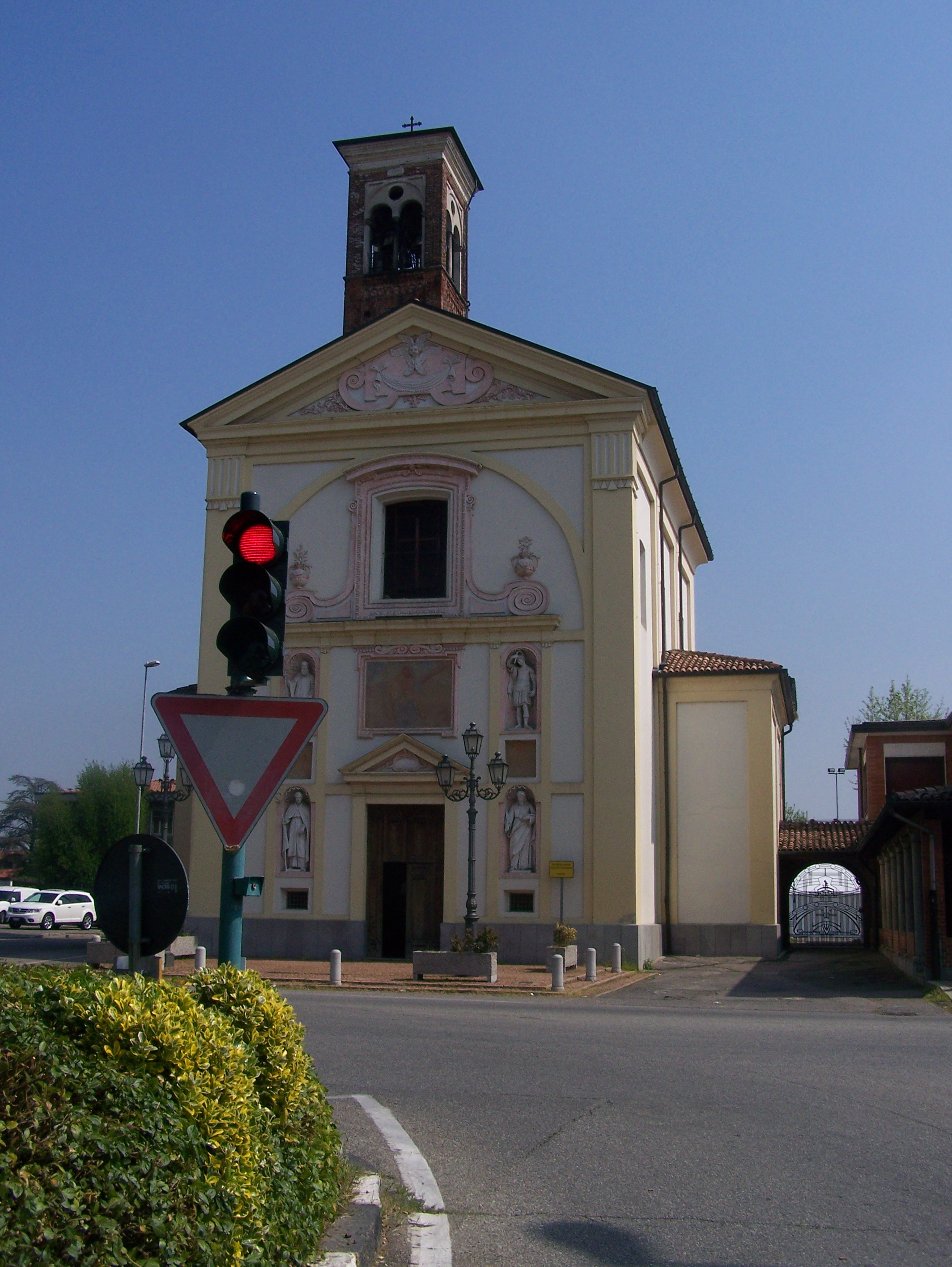 Santuario della Madonna Addolorata e di San Bernardo a Mesero (MI) - Italy